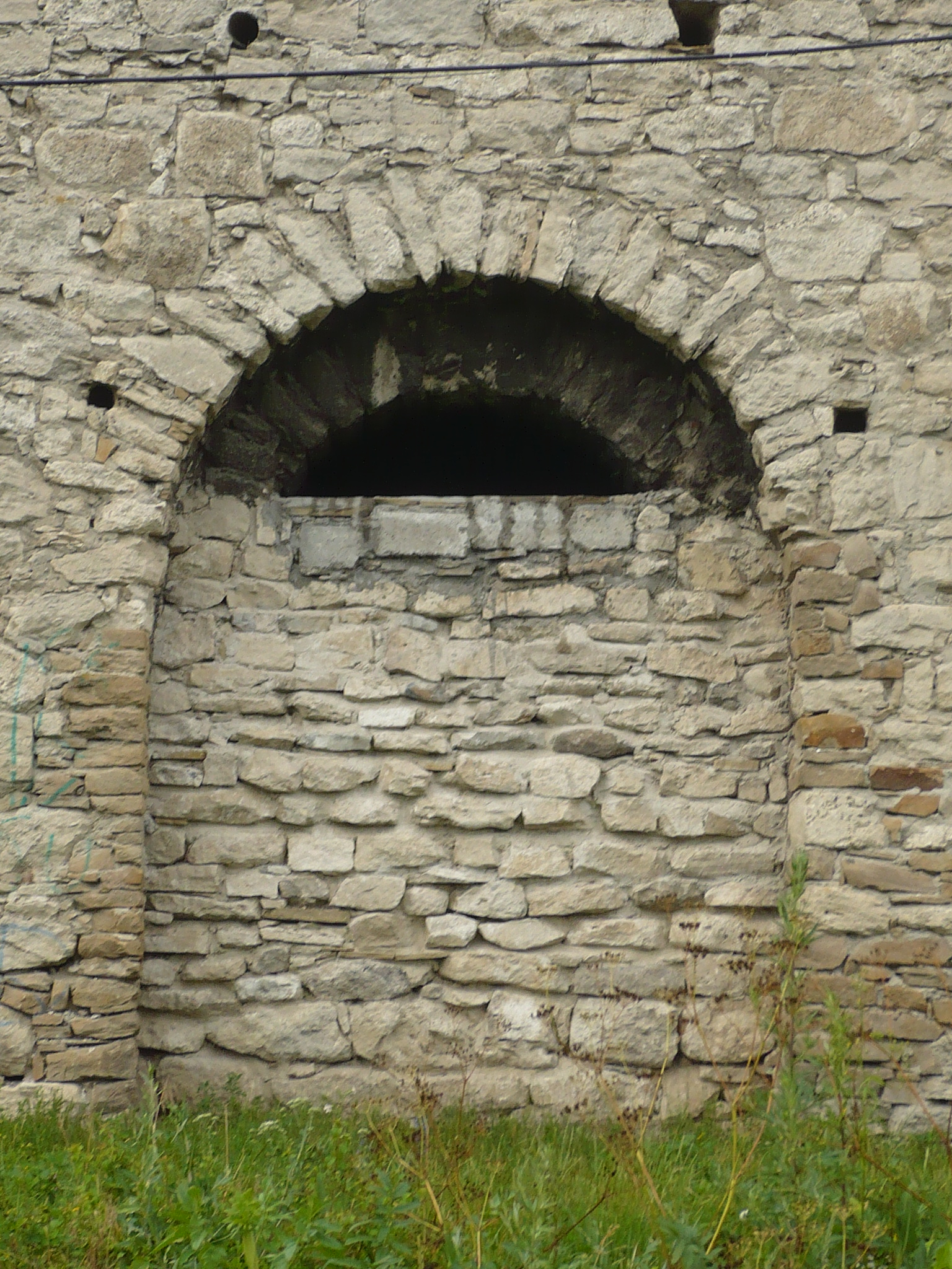 Czortków. Zamek